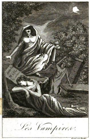 Grabado en el Frontispicio del libro "Histoire des vampires et des spectres malfaisans: avec un examen du vampirisme" Publicado por Masson, Paris 1820 de Collin de Plancy